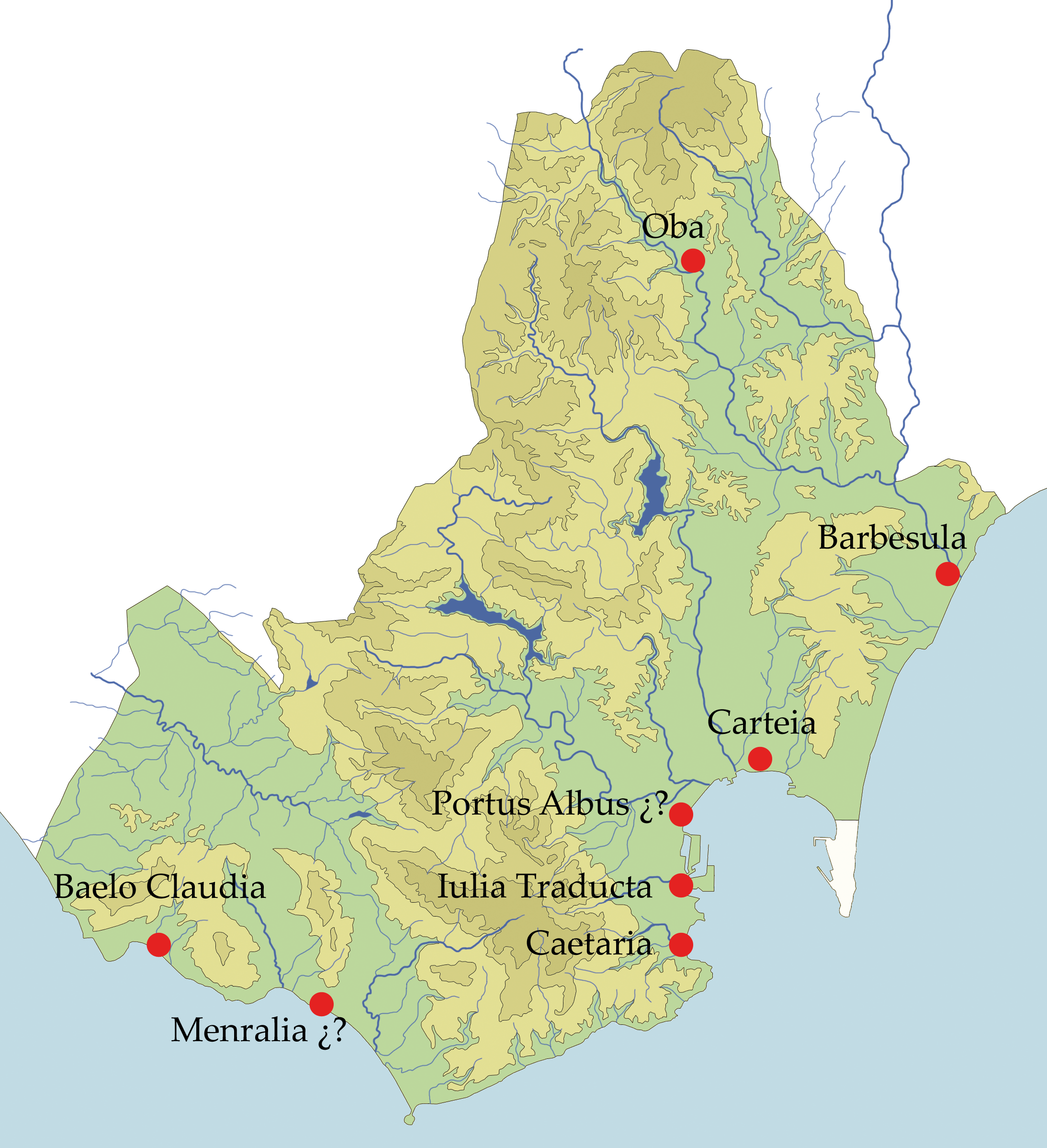 Plano de localidades del Campo de Gibraltar en el siglo I.